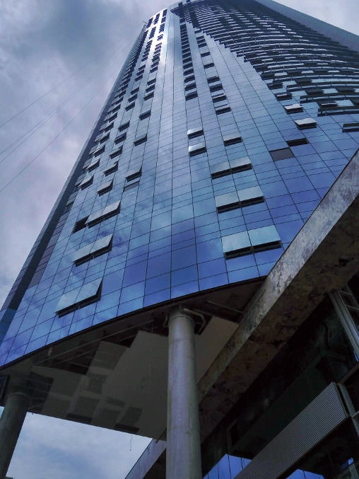 Edifício em Goiânia